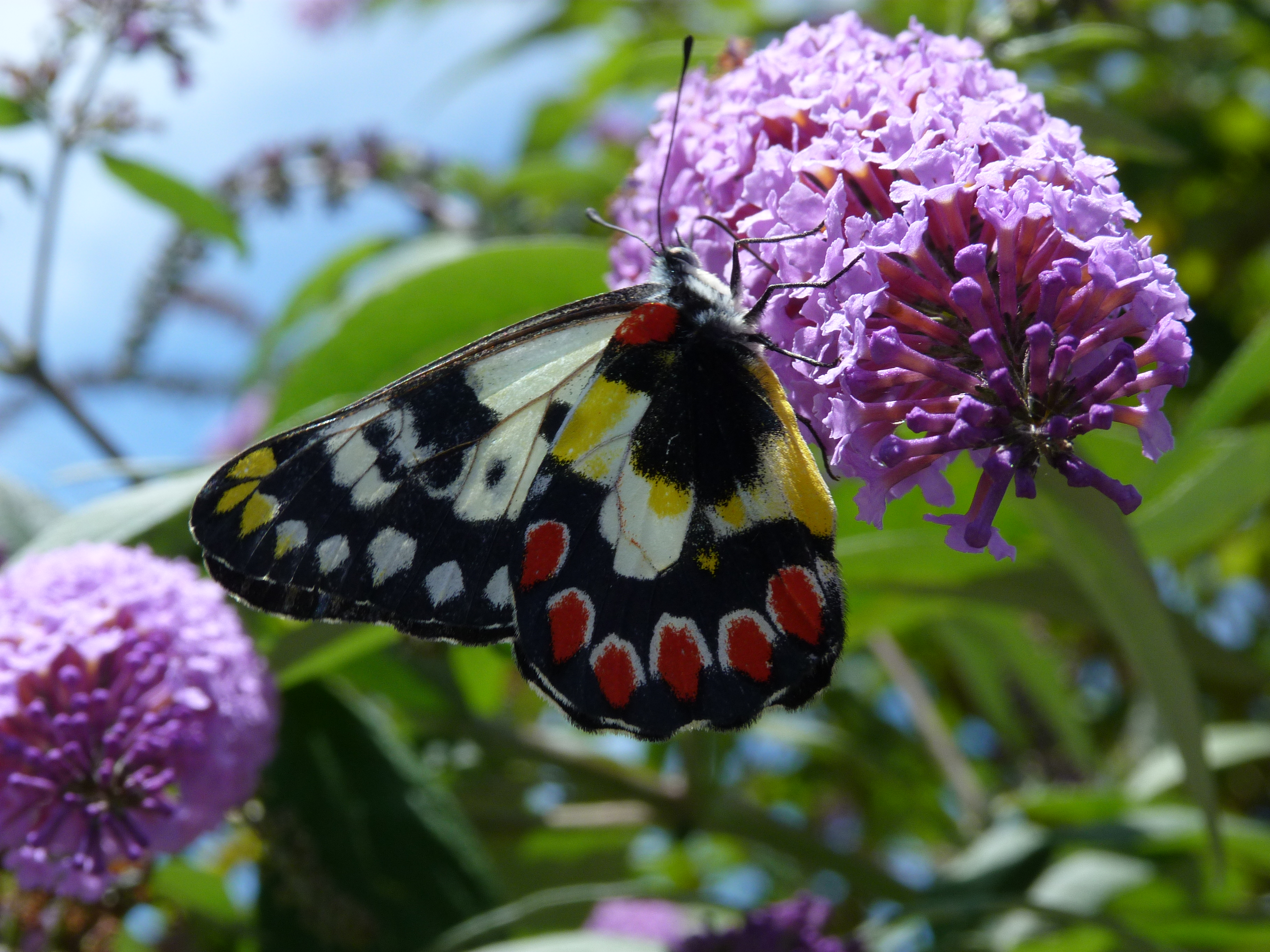 Delias aganippe (Donovan, 1805), Katoomba, NSW, 25 January 2011